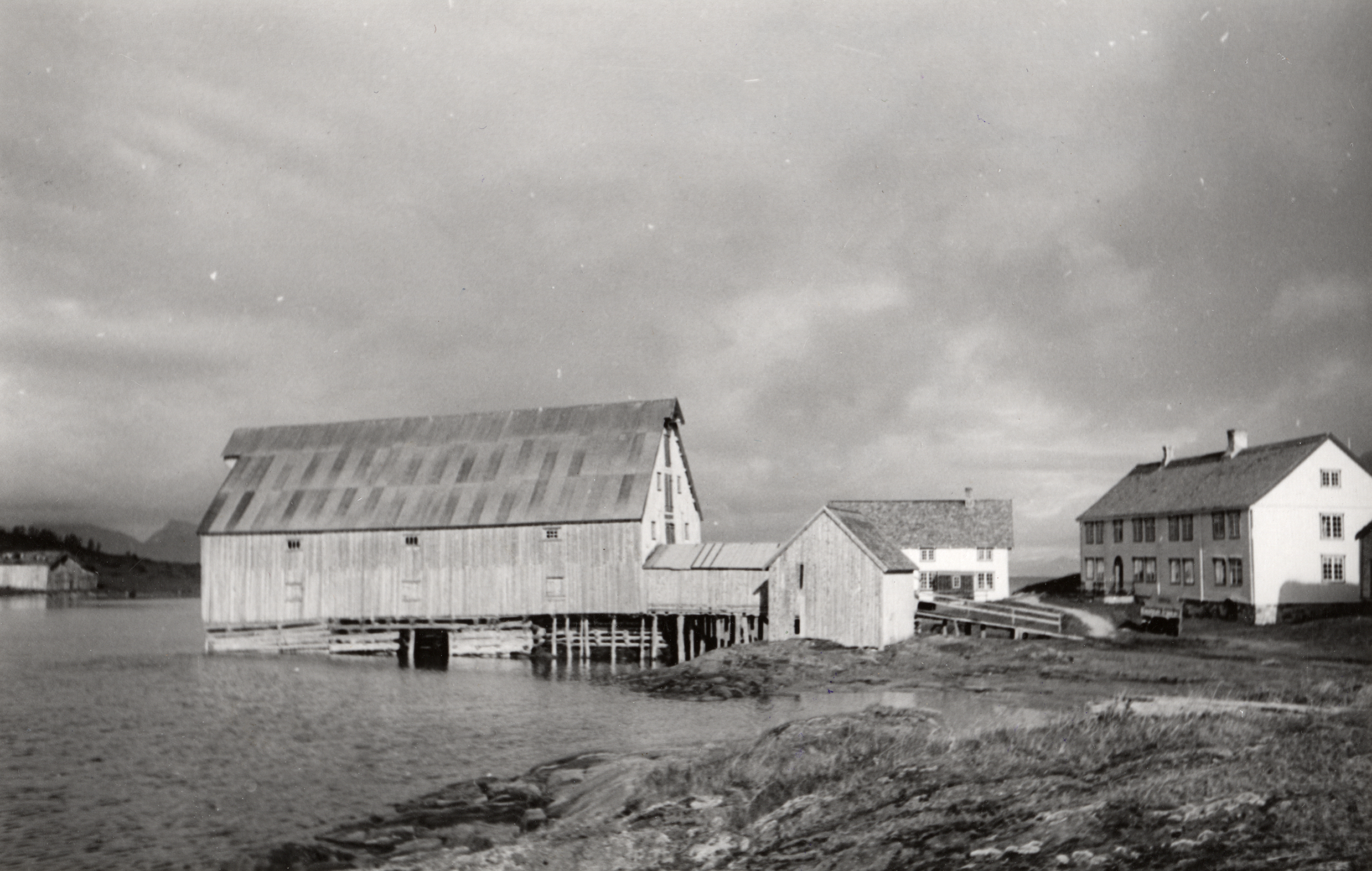 Kjerringøy handelssted i Bodø, Nordland Oversikt Oversikt